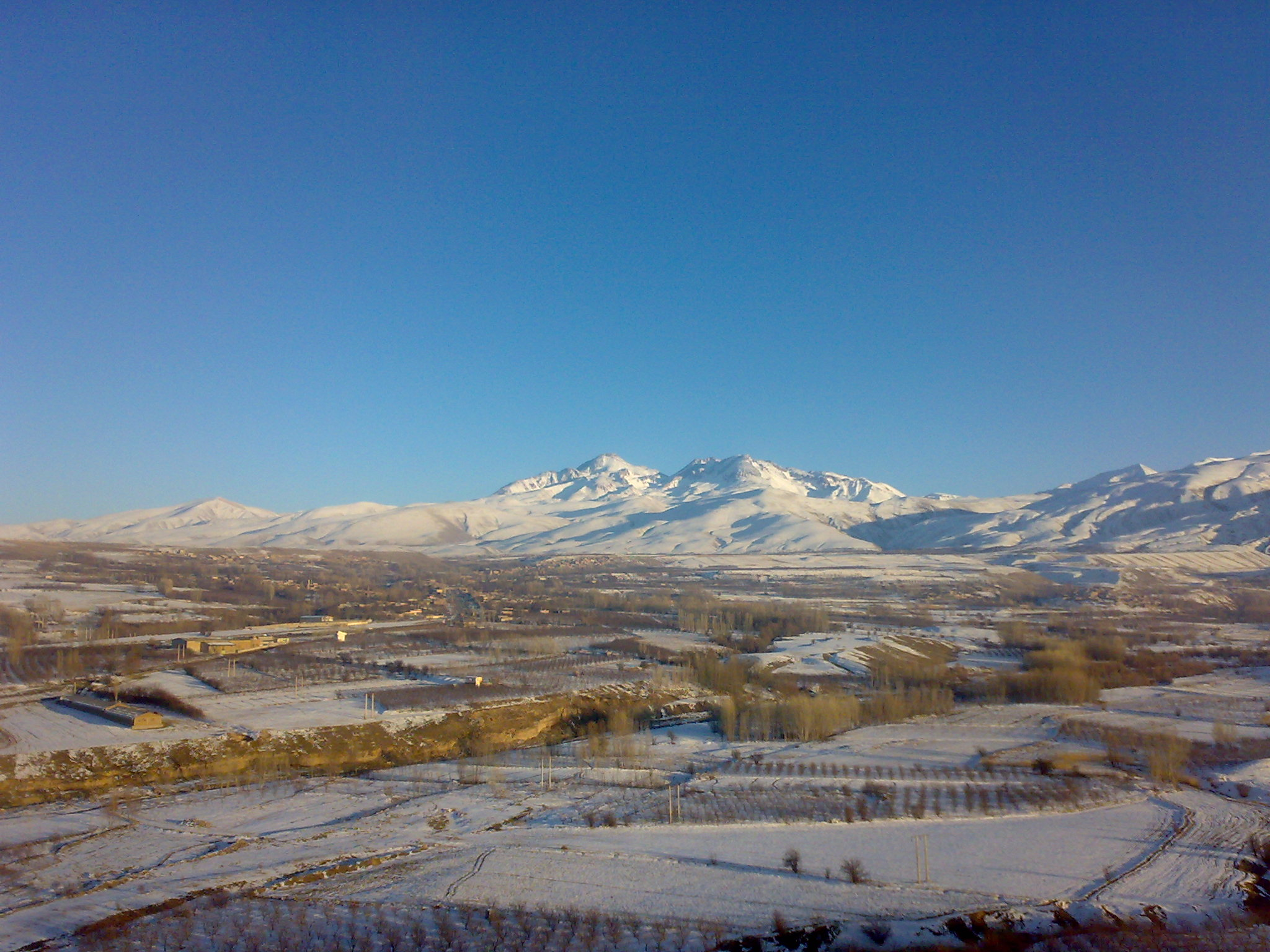 نمای روستا در زمستان